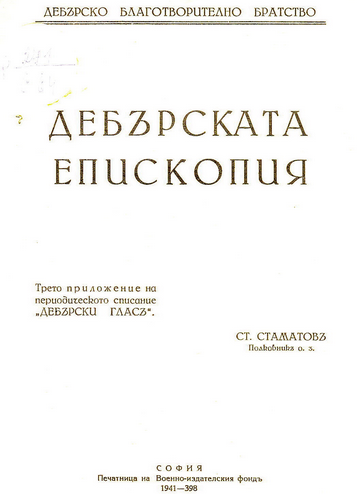 Дебърската епископия